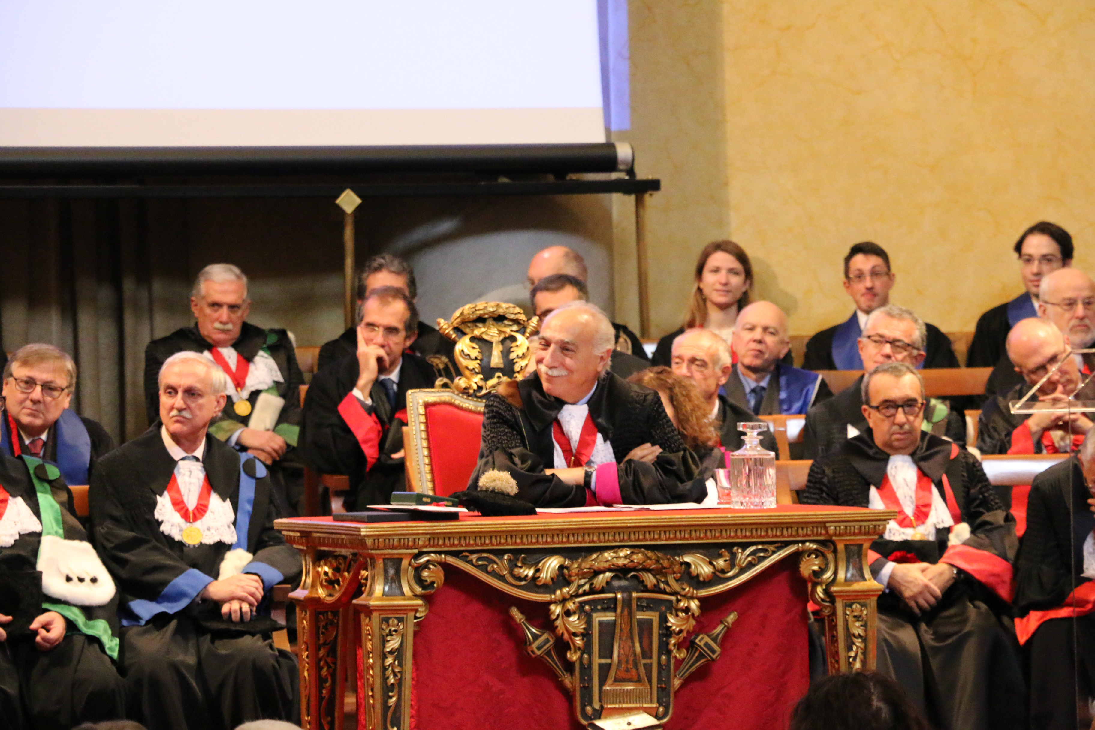 Inaugurazione Anno Accademico 2016/2017 - 15 novembre 2016